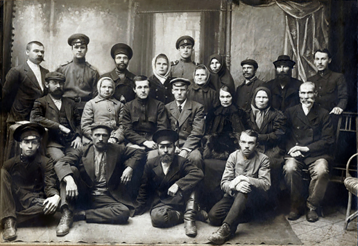 Чебоксарский совет рабочих и солдатских депутатов. Первый ряд, сидят на полу: Второй слева – БАРАНОВ ВАСИЛИЙ ИВАНОВИЧ, представитель Рабочего комитета Ефремовского лесопильного завода и Чебоксарского Союза деревообделочников. Четвертый слева - КРЫНЕЦКИЙ ИВАН АЛЕКСЕЕВИЧ, служащий, избран помощником Секретаря Совета, возглавил культурно-просветительскую секцию Совета. Второй ряд: Первый слева - УШАКОВ ВАСИЛИЙ ИВАНОВИЧ, кузнец, представитель комитета бедноты от ул. Ярославская г. Чебоксары. Вторая слева - ЗИМИНА М.М., бывшая кухарка. Третий слева - ПЕНЗИН ИВАН Ф., старший унтер-офицер, избран Секретарём Совета; Четвертый слева - ГРАСИС КАРЛ ЯНОВИЧ, латышский студент, политический ссыльный. Избран Председателем Совета; Пятая слева – СОФЬЯ ДАНИК Третий ряд: Первый слева - ЗИМИН АНДРЕЙ ИВАНОВИЧ, рабочий казенного винного склада № 3. Товарищ (заместитель) Председателя Совета. Второй слева – солдат ИВАКИН М. Пятый слева – солдат ГАВРИЛОВ И.